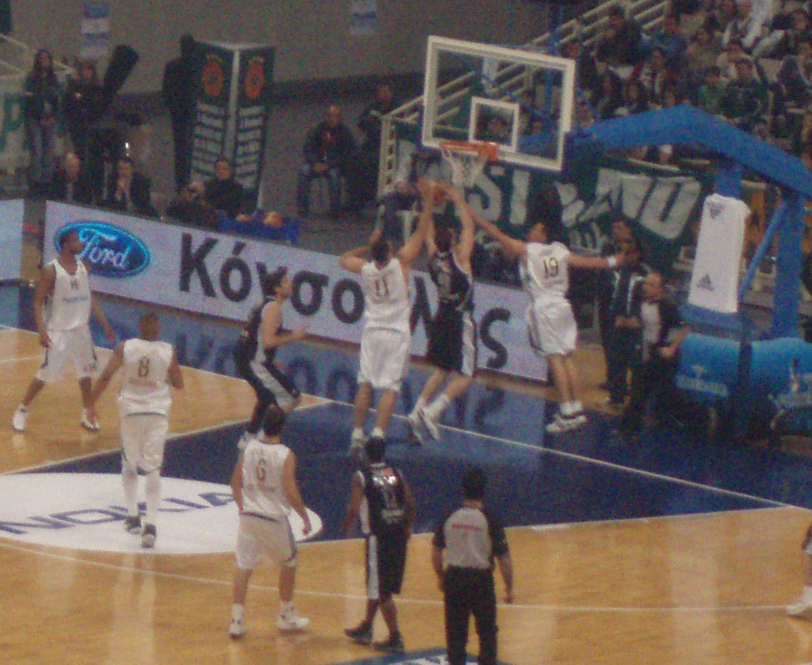 Panathinaikos players